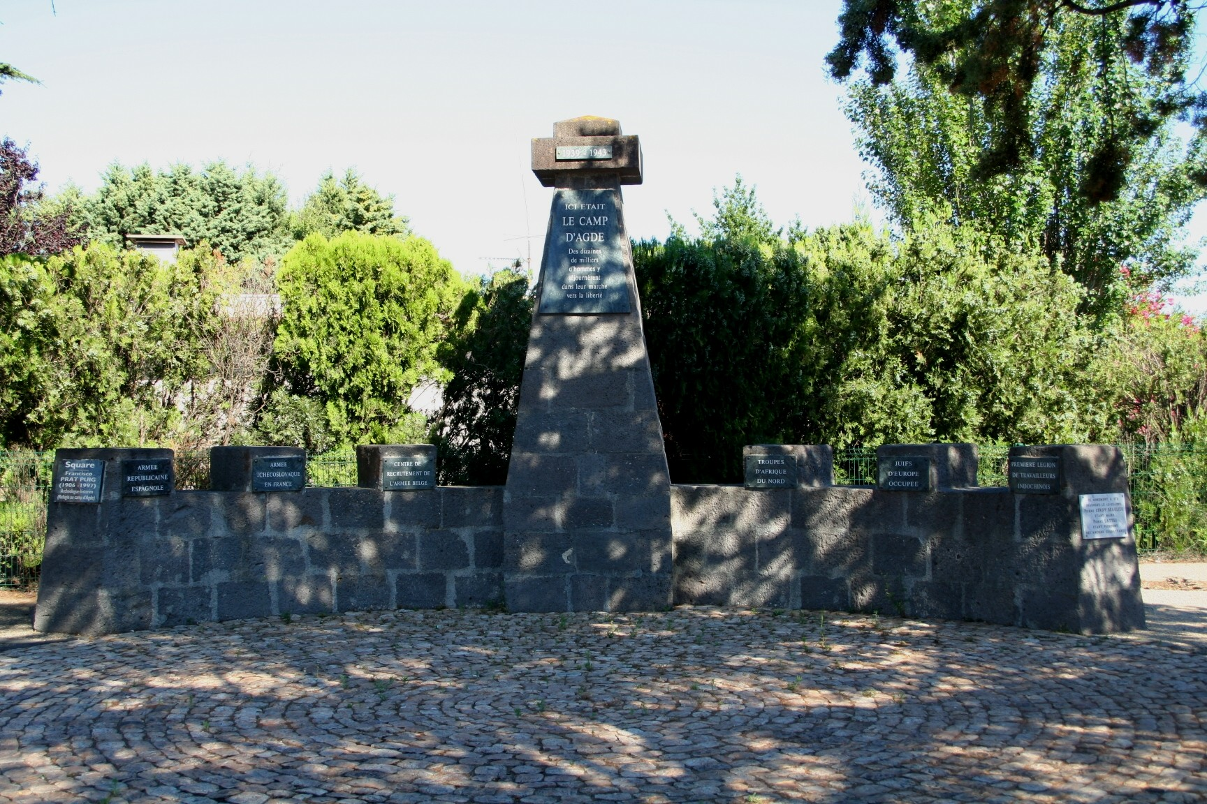 Monument commémoratif du camp d'Agde (Hérault, France), avenue Paul Balmigère, érigé en 1989 à l'occasion du cinquantenaire de la création du camp